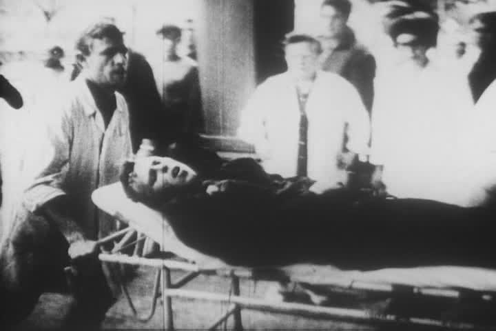 Sovětský voják, omylem postřelený spolubojovníky, který později zemřel